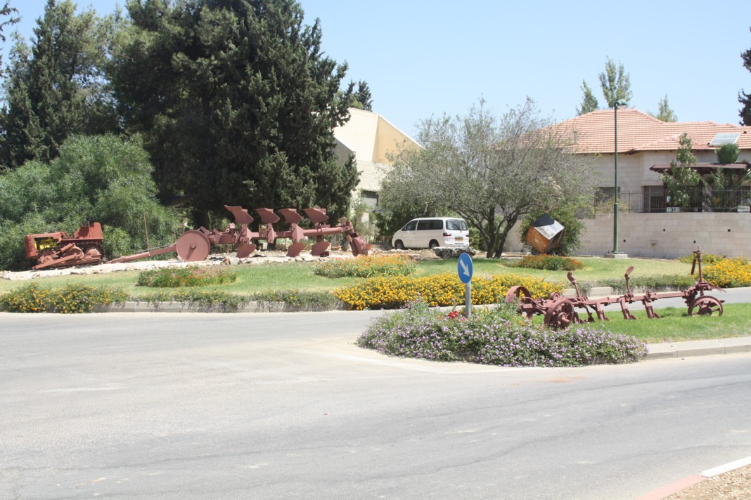 הכניסה למבוא בית"ר Entrance to Mevo Beitar